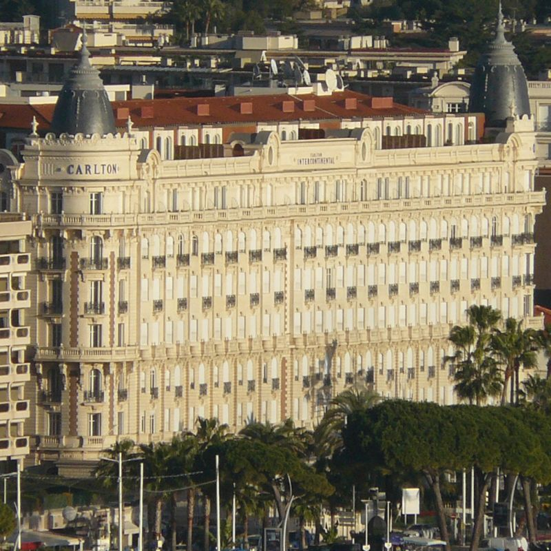 Hôtel Carlton à Cannes, vu de la tour de la Castre au Suquet .